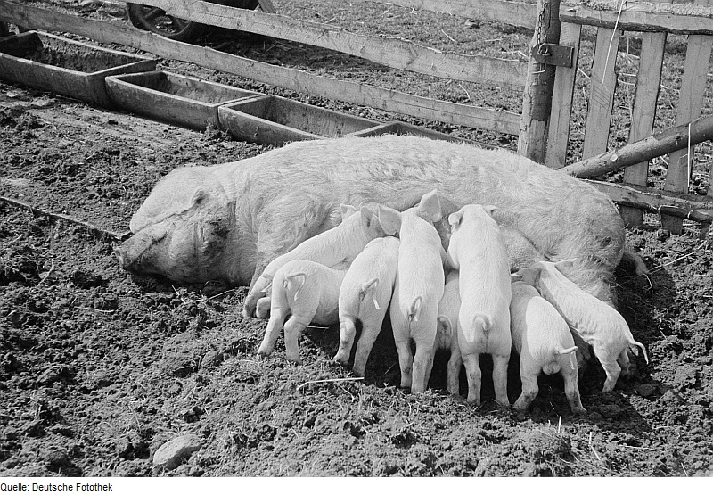 Original image description from the Deutsche Fotothek Sau mit Ferkeln im Freigehege